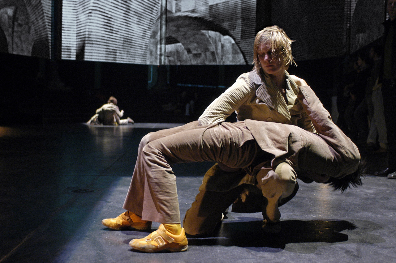 Saskia Höbling bei der 2004 entwickelten Choreografie Labyrinth